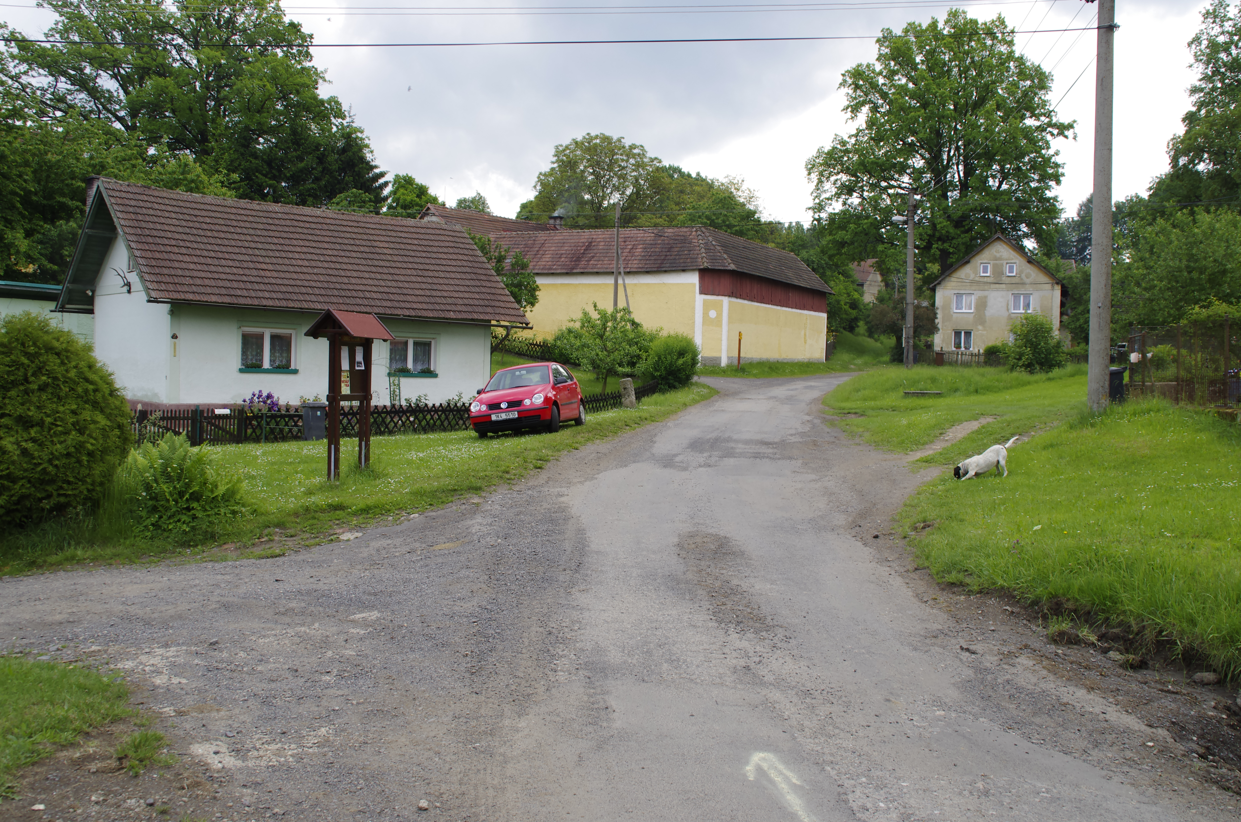 Palič (Lipová), ve středu obce This image was acquired during the event Wikiměsto Mariánské Lázně.